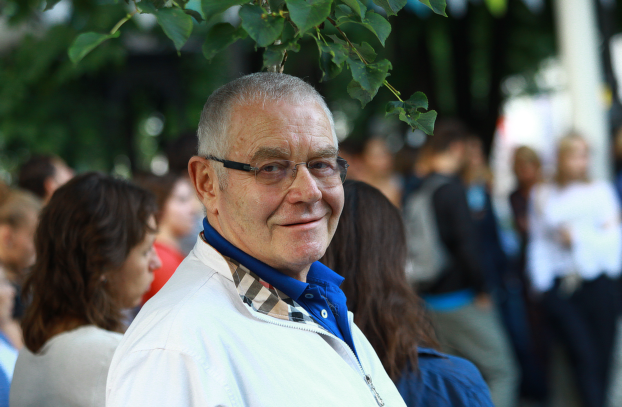 Встреча нового главреда "Искусства кино" с читателями журнала в саду Эрмитаж